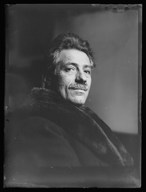 Fritz Kreisler (1875–1962)